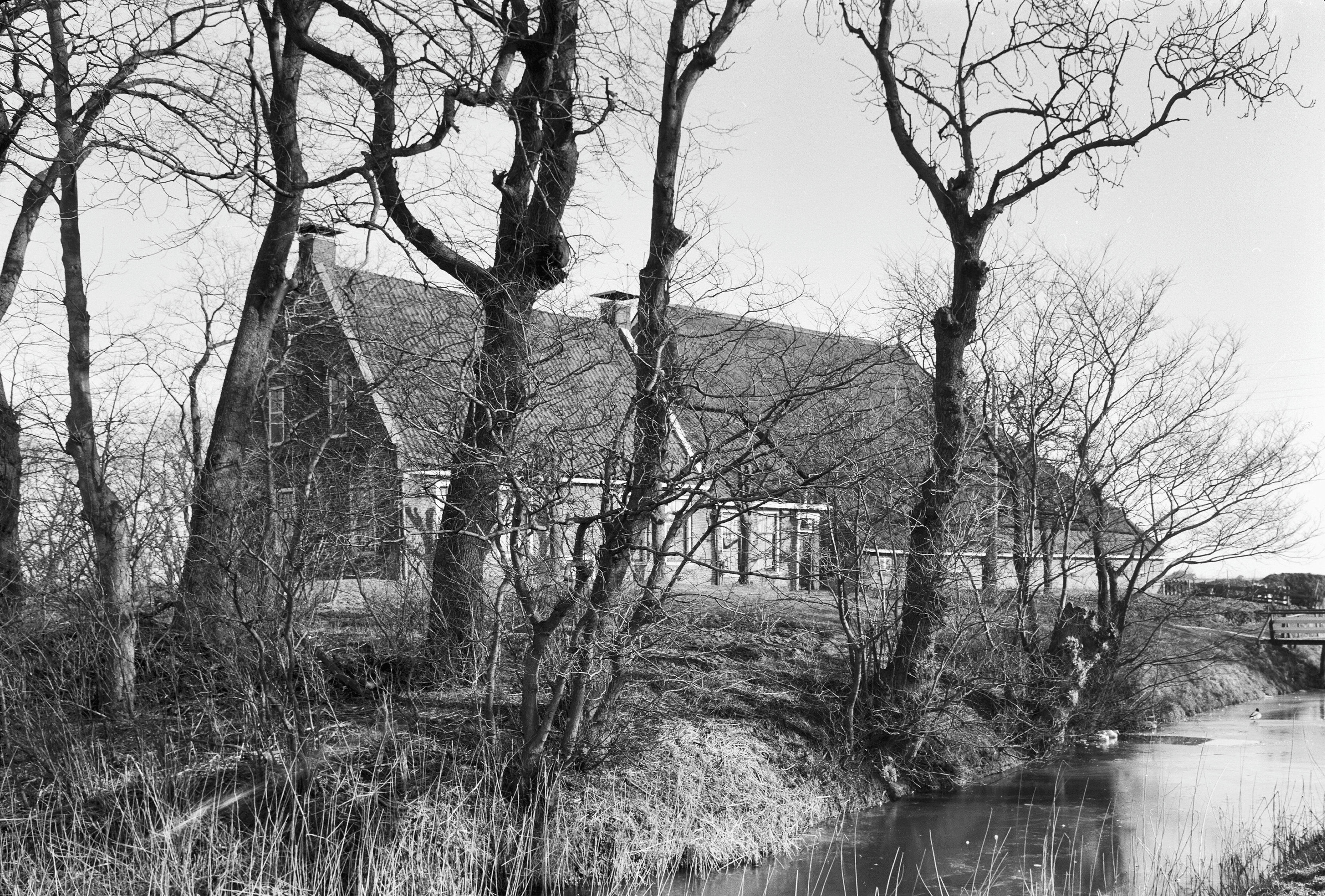 Stinstra State: Overzicht van kop-hals-rompboerderij met sloot en geboomte op de voorgrond (opmerking: Boerderij A5)